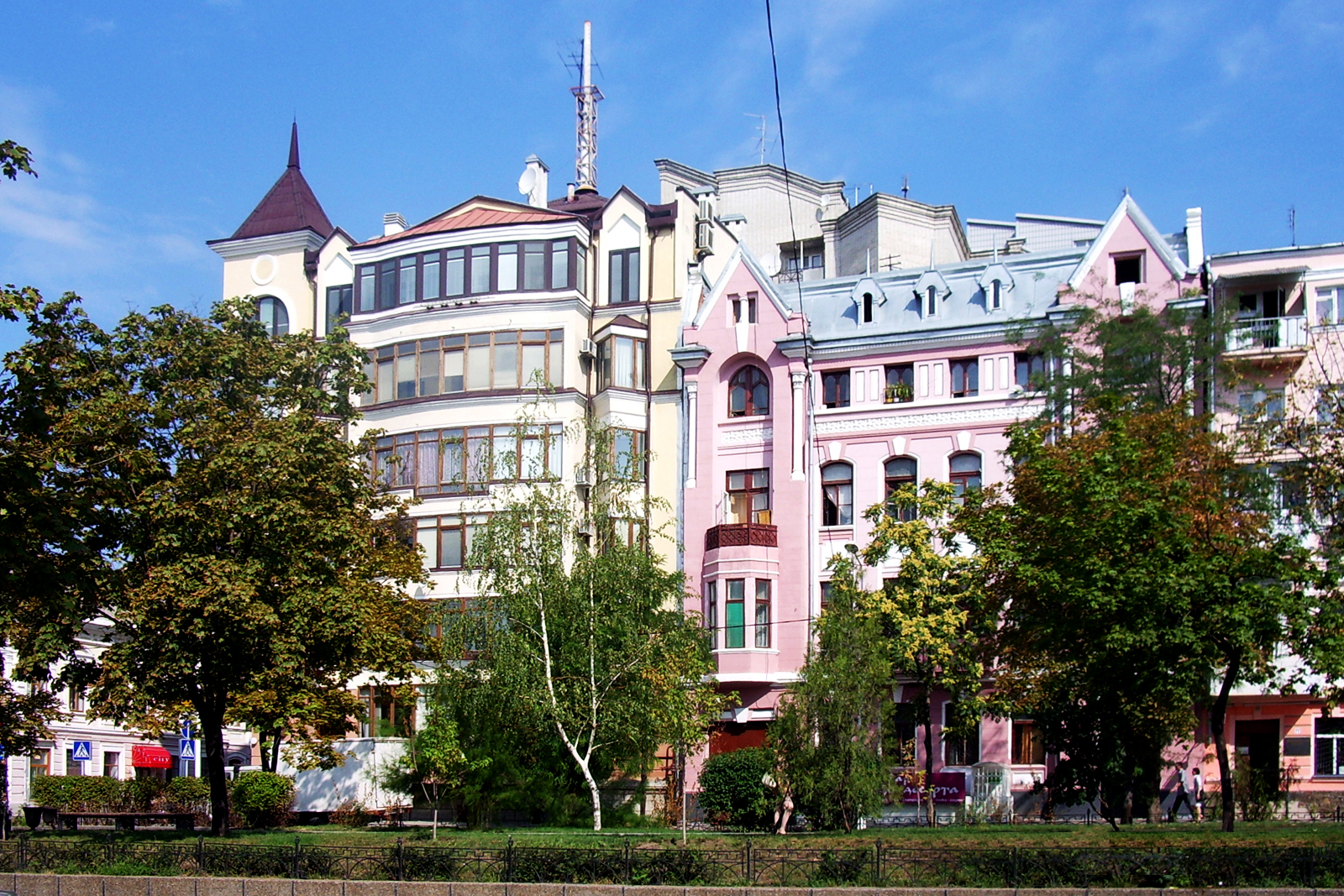 Доходный Дом И.А.Э.ЛАША. Начало 20 века. Ростов-на-Дону